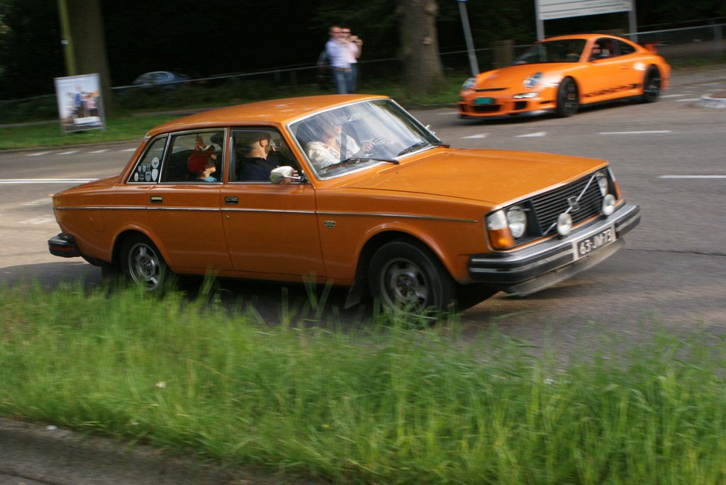 63-JM-73